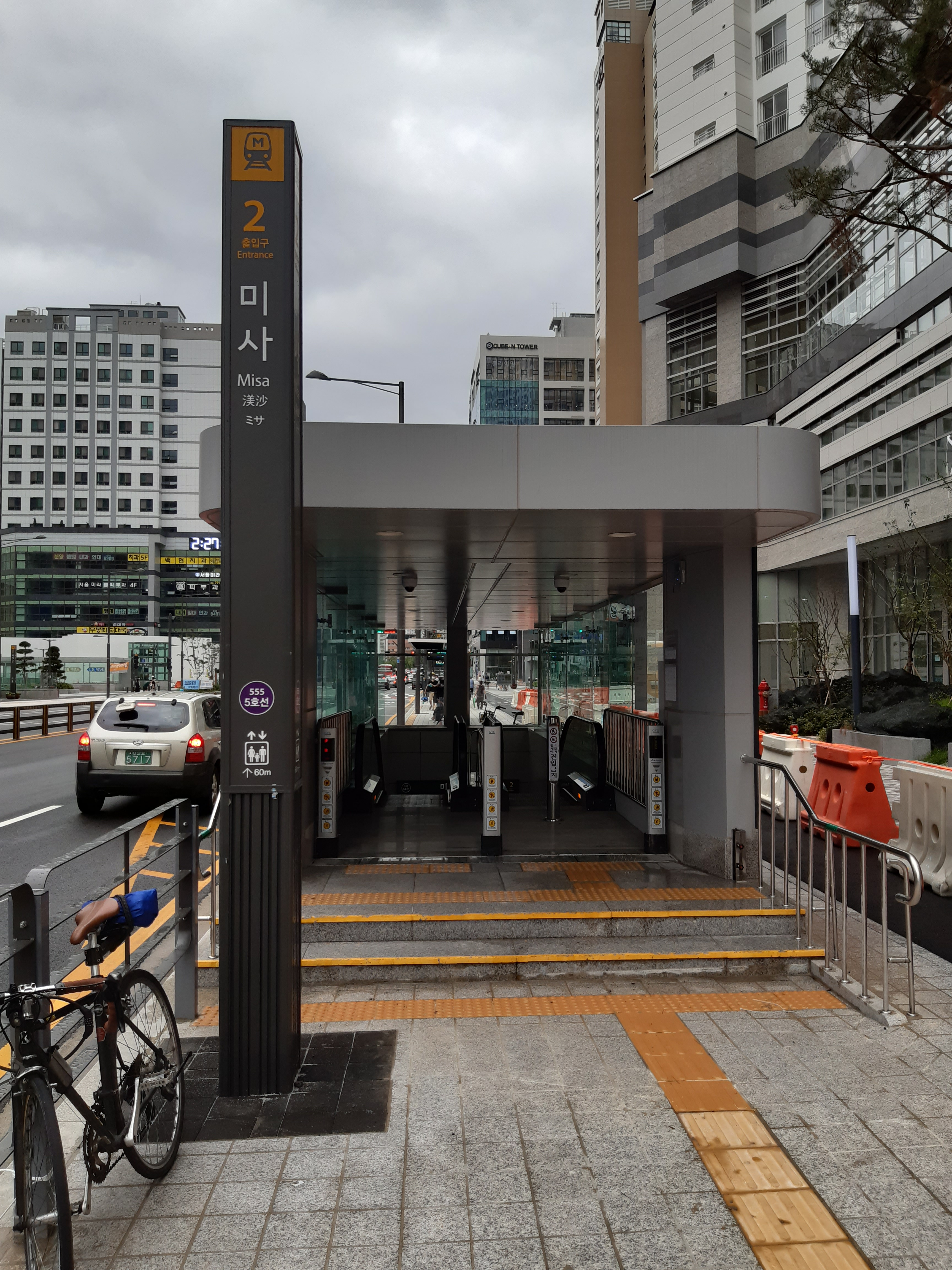 미사역 2번출구